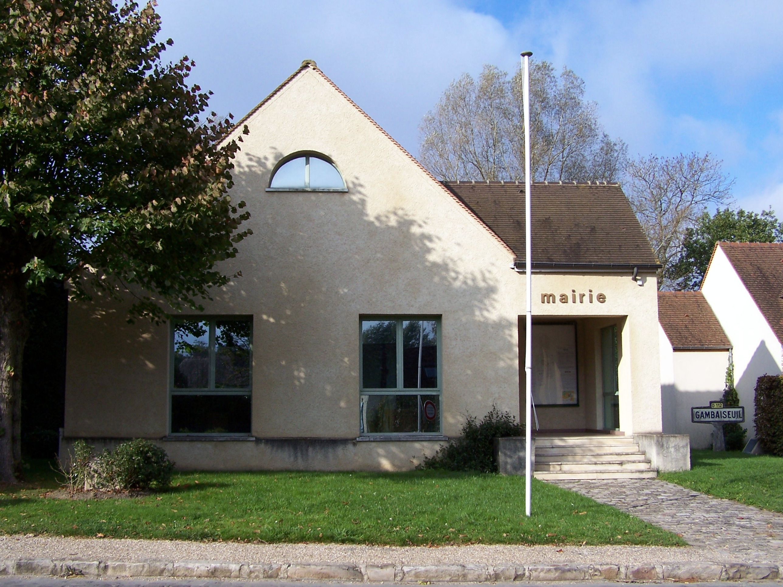 Mairie de Gambaiseuil (Yvelines, France)